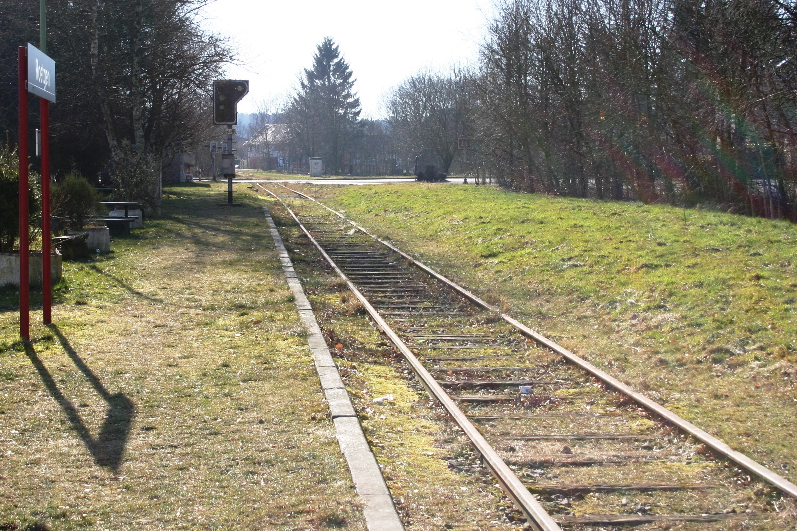 Vennbunn Gleiser an der Gare zu Roetgen Directioun Sankt Vith. Am fong de Gleisiwwergang op der Bundestrooss B 258.